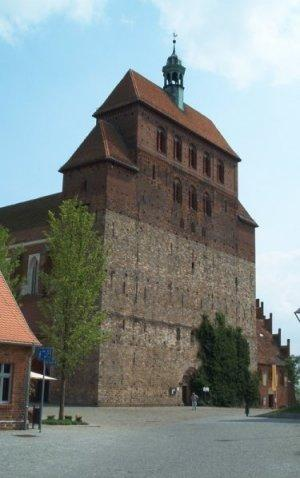 Der Westturm des Havelberger Domes